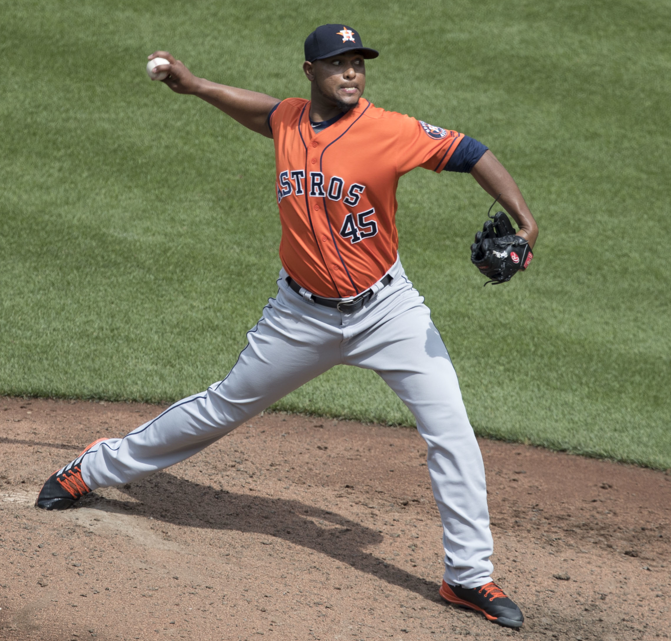 Astros at Orioles 7/23/17